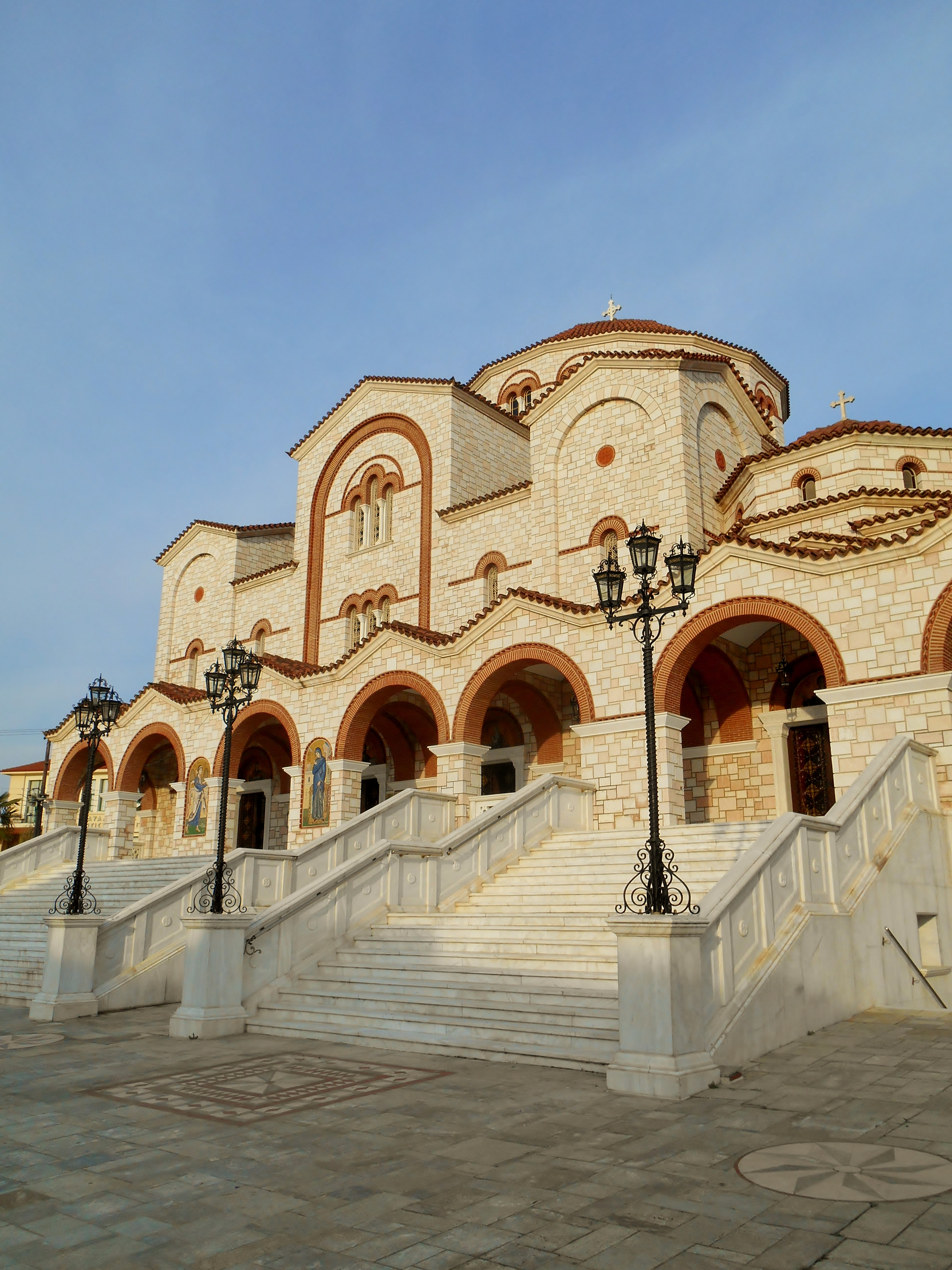 Νέα Μηχανιώνα.